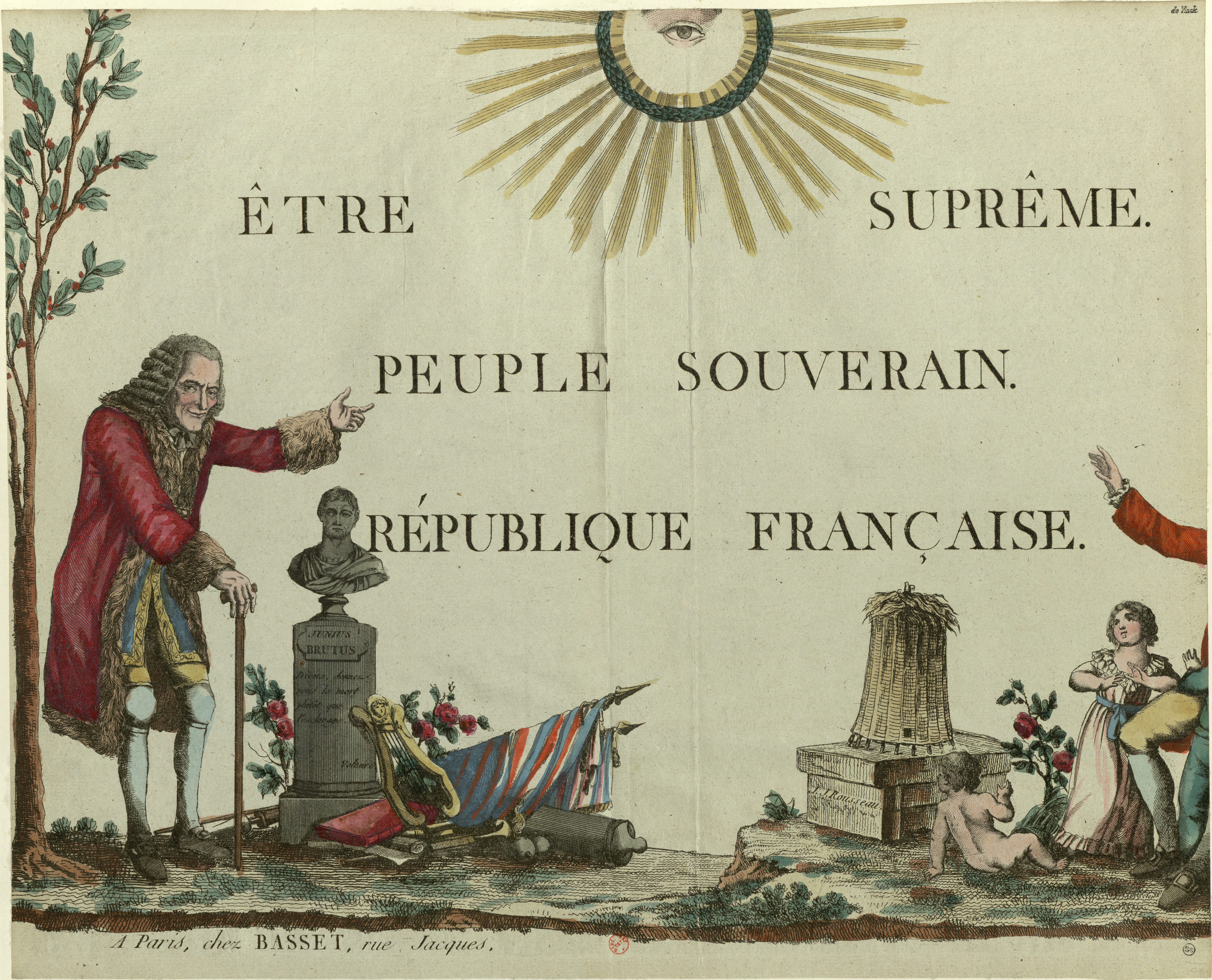 Être suprême. Peuple souverain. République française, estampe anonyme publiée chez Basset, Paris, 1794.